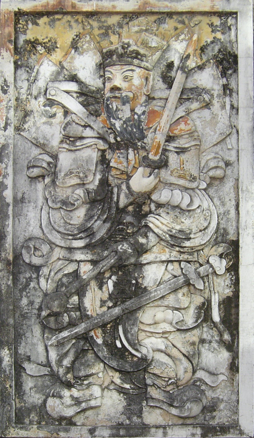 中文（台灣）: 高雄市左營區鳳山縣舊城北門外壁門洞左側門神．神荼。